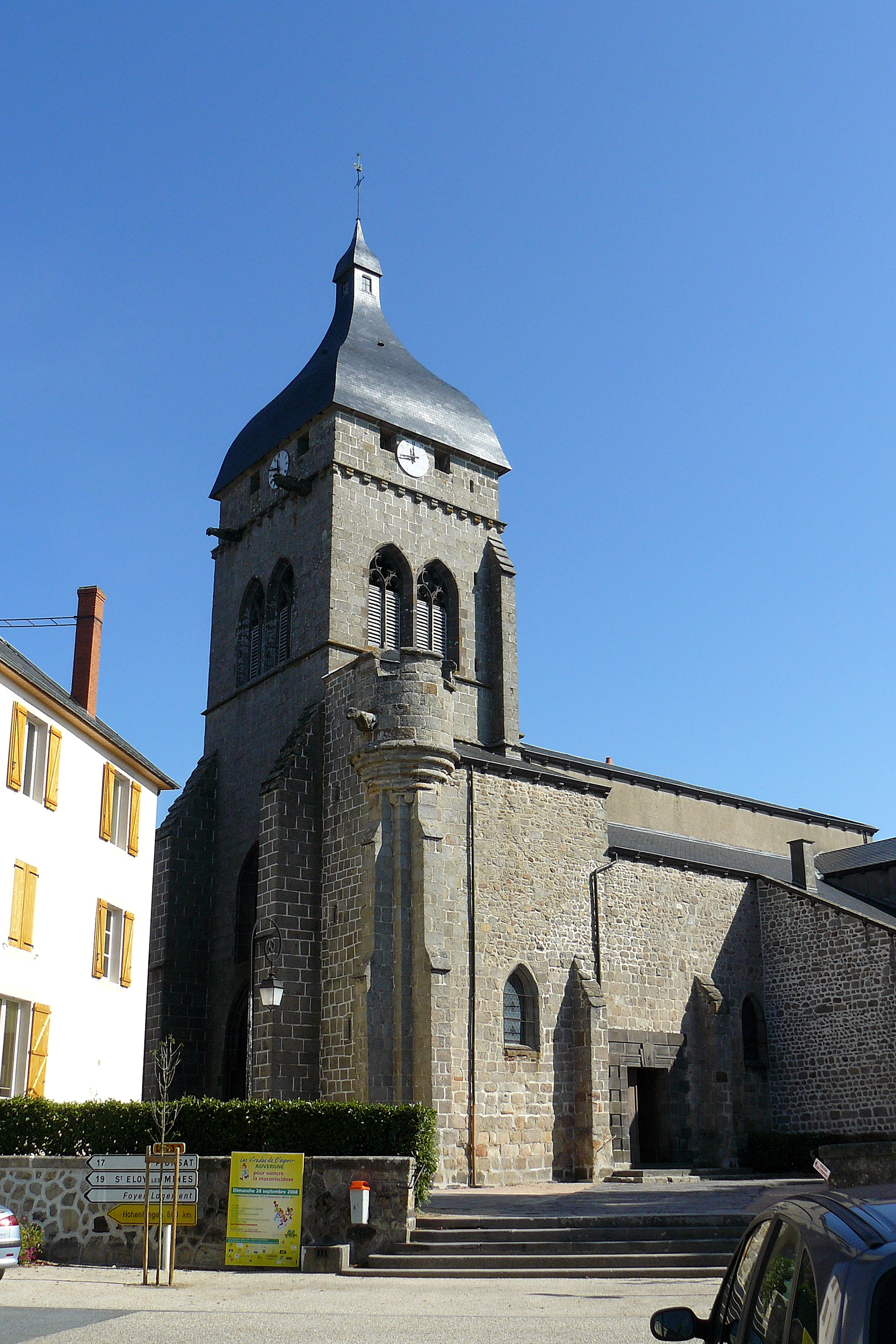 L'église de Saint-Gervais-d'Auvergne (Puy-de-Dôme, France)